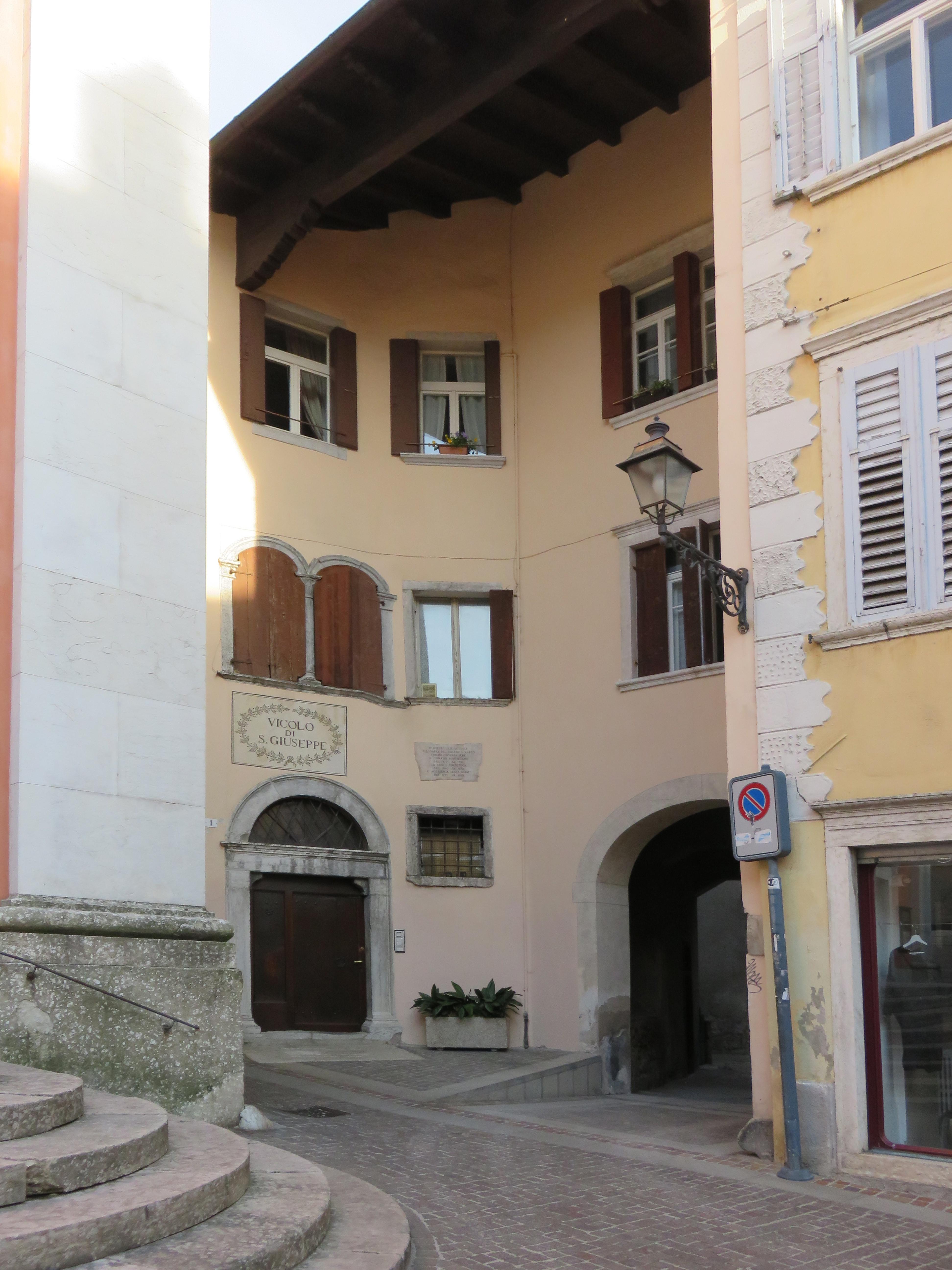 Vicolo San Giuseppe, Rovereto, accanto a piazza San Marco. Una delle antiche sedi dell'Accademia Roveretana degli Agiati